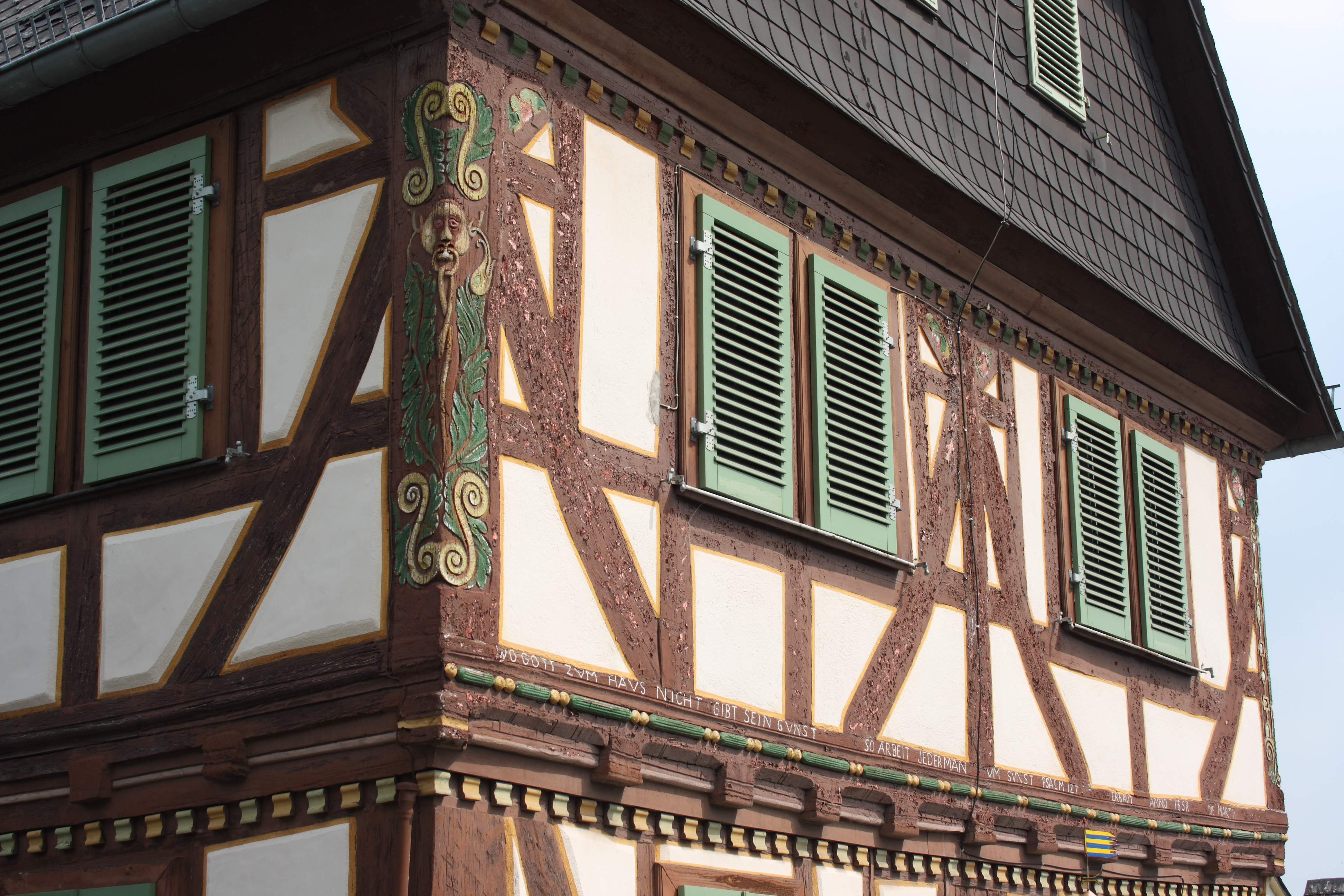 Haus Schütt 2 in Braunfels im Lahn-Dill-Kreis (Hessen)